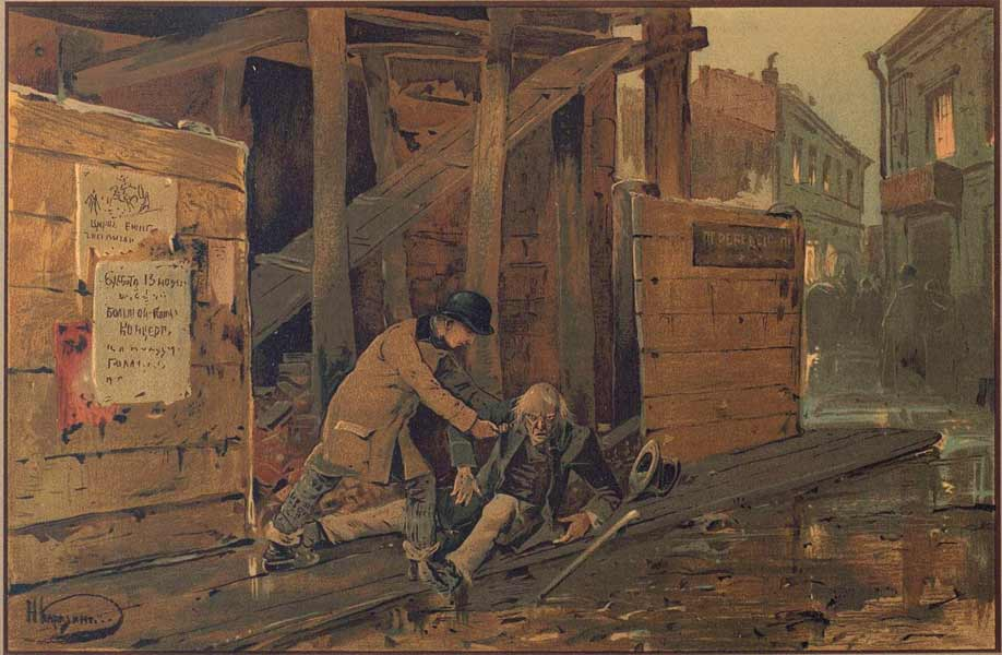 Иллюстрация к роману "Униженные и оскорбленные" Николай Каразин, 1893